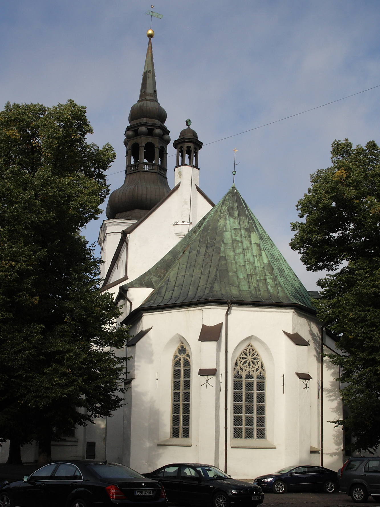 Tallinna Toomkirik, 13.-19.saj